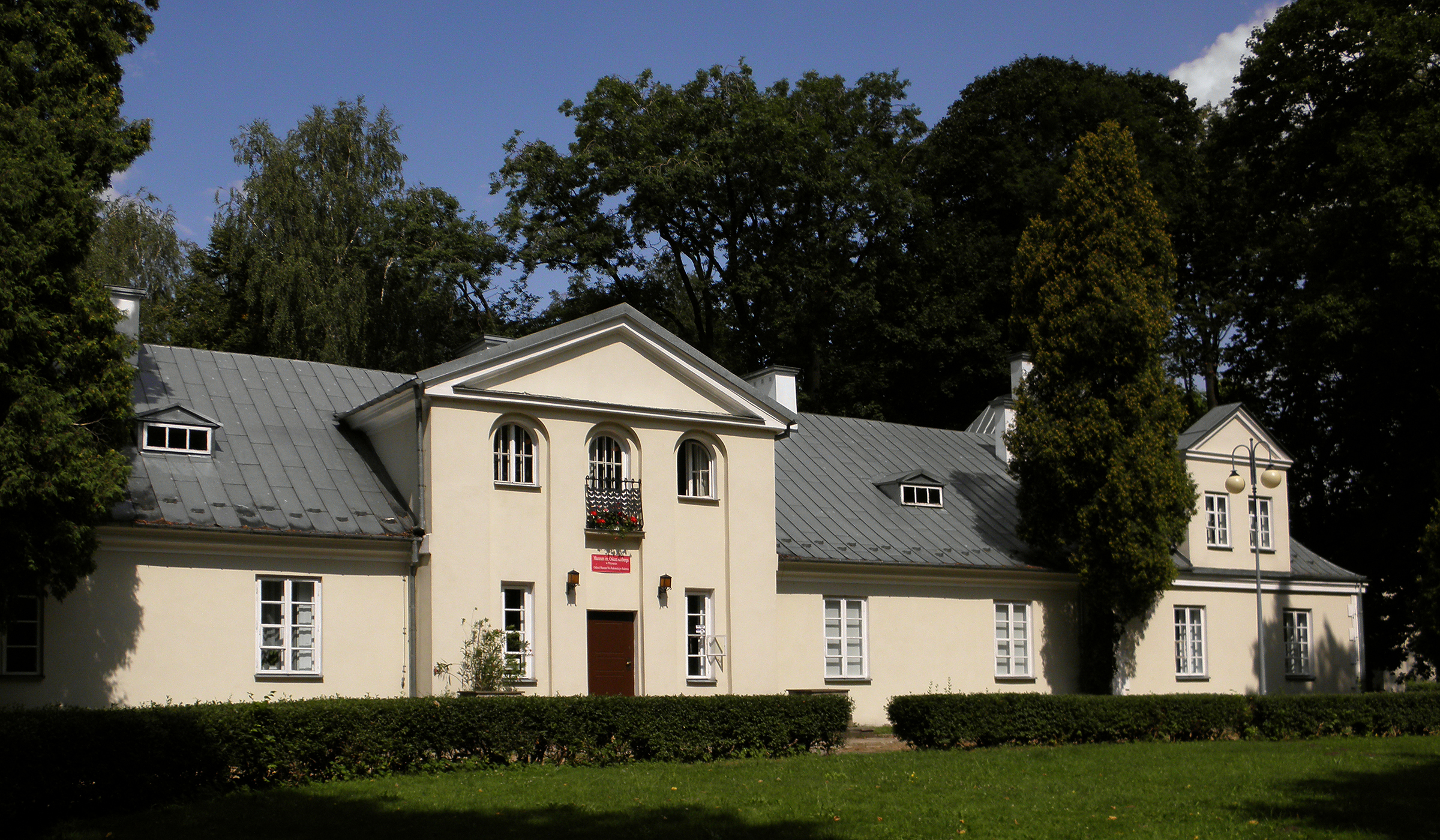 Przysucha, Aleja Jana Pawła II 11 - dwór Dembińskich, obecnie muzeum (zabytek nr 873/A z 16.04.1962, 653/A z 14.01.1972 oraz 140/A z 15.03.1982)